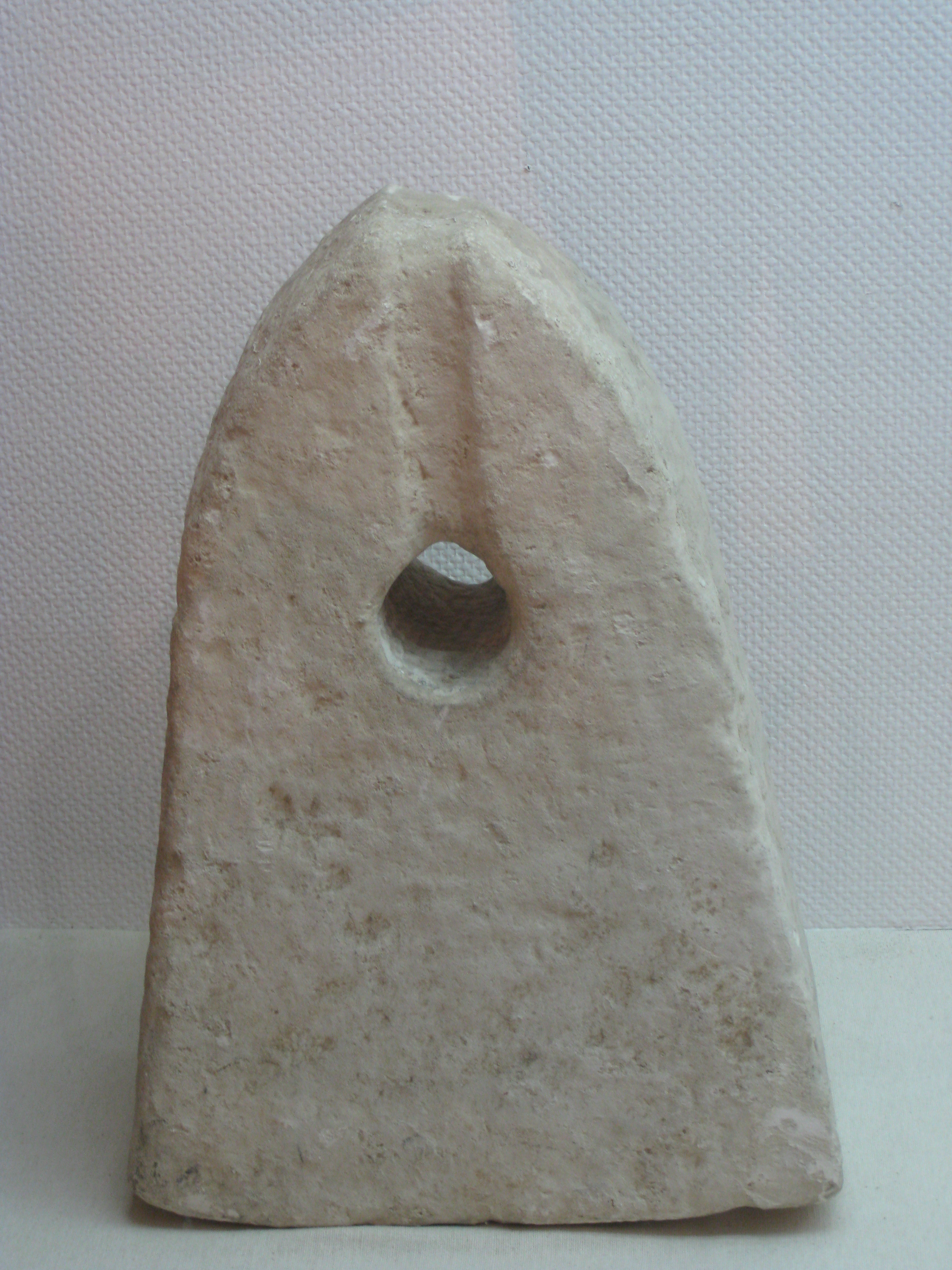 National Maritime Museum, Israel - Stone Anchor, Canaanite peroid, 22nd - 20th Century BC, Recovered from the sea near the coast of Egypt המוזיאון הימי הלאומי בחיפה עוגן אבן, התקופה הכנענית, המאה ה-22 עד המאה ה-20 לפנה"ס. התגלה בתוך הים לחופי מצריים